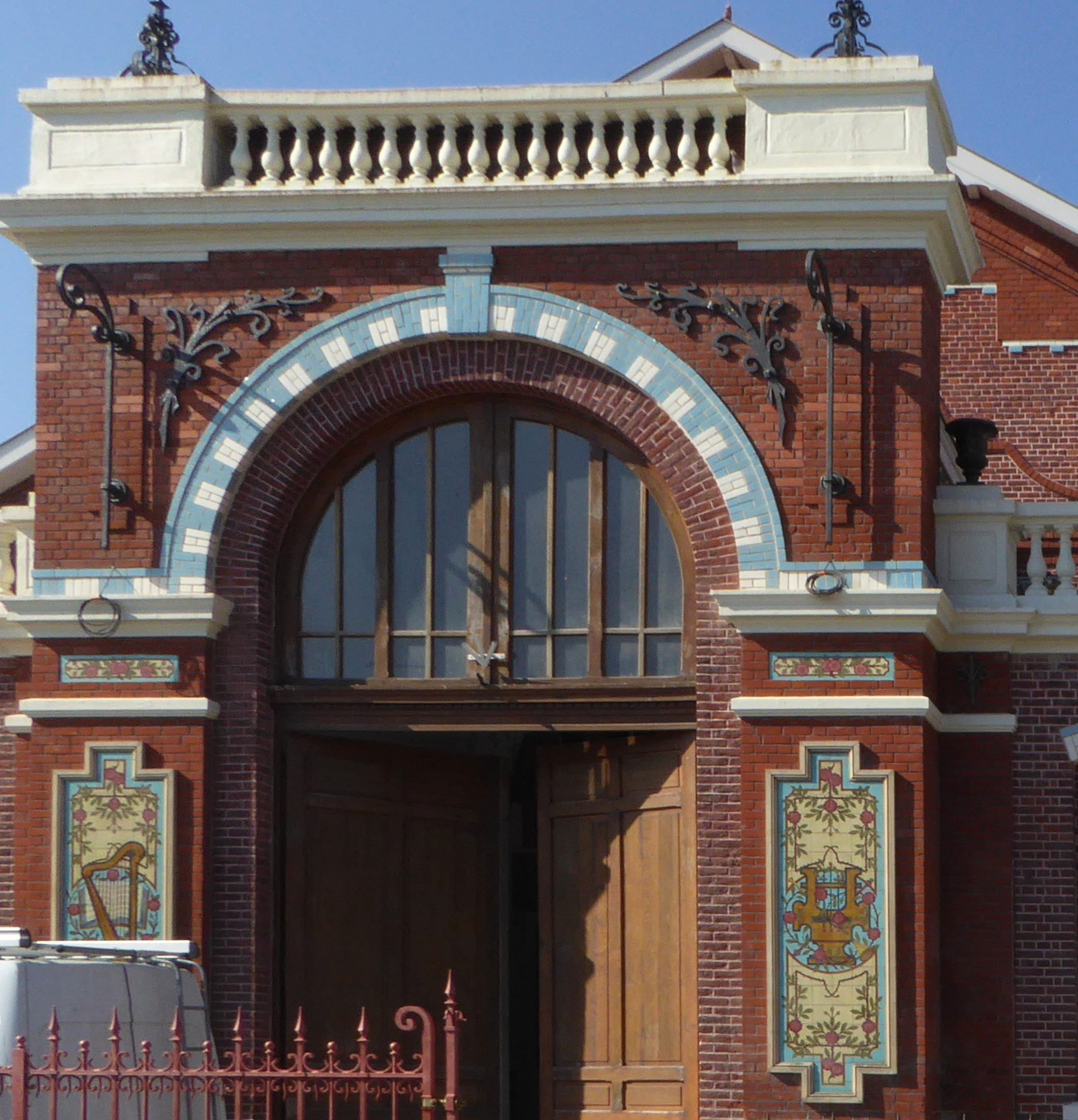 Salle des fêtes des cités de la fosse Arenberg des mines d'Anzin.- Nord (département français). .